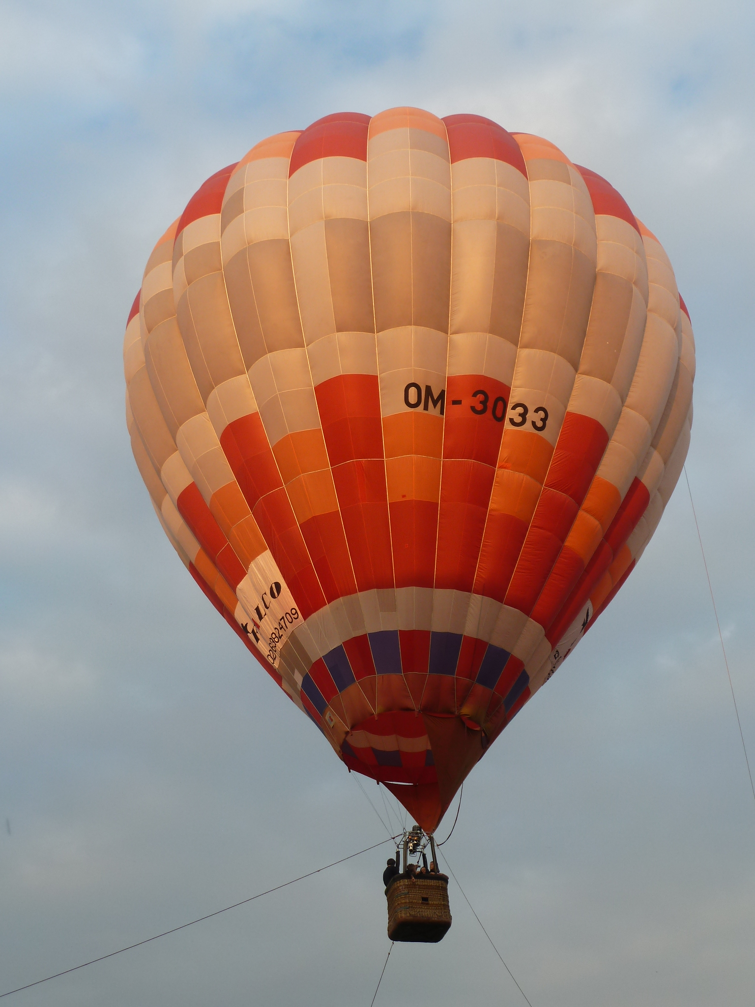 Teplovzdušný balón v Lamači